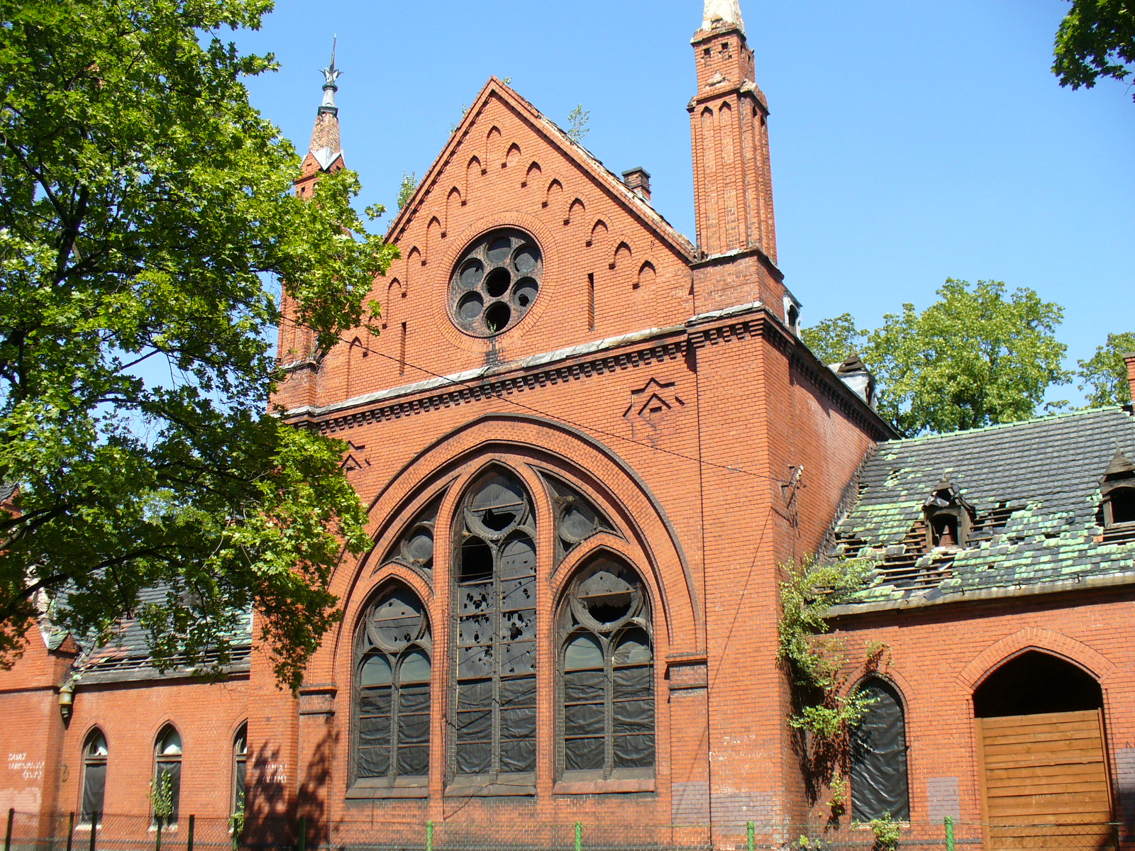 Gleiwitz - Gliwice. Dom przedpogrzebowy przy cmentarzu żydowskim